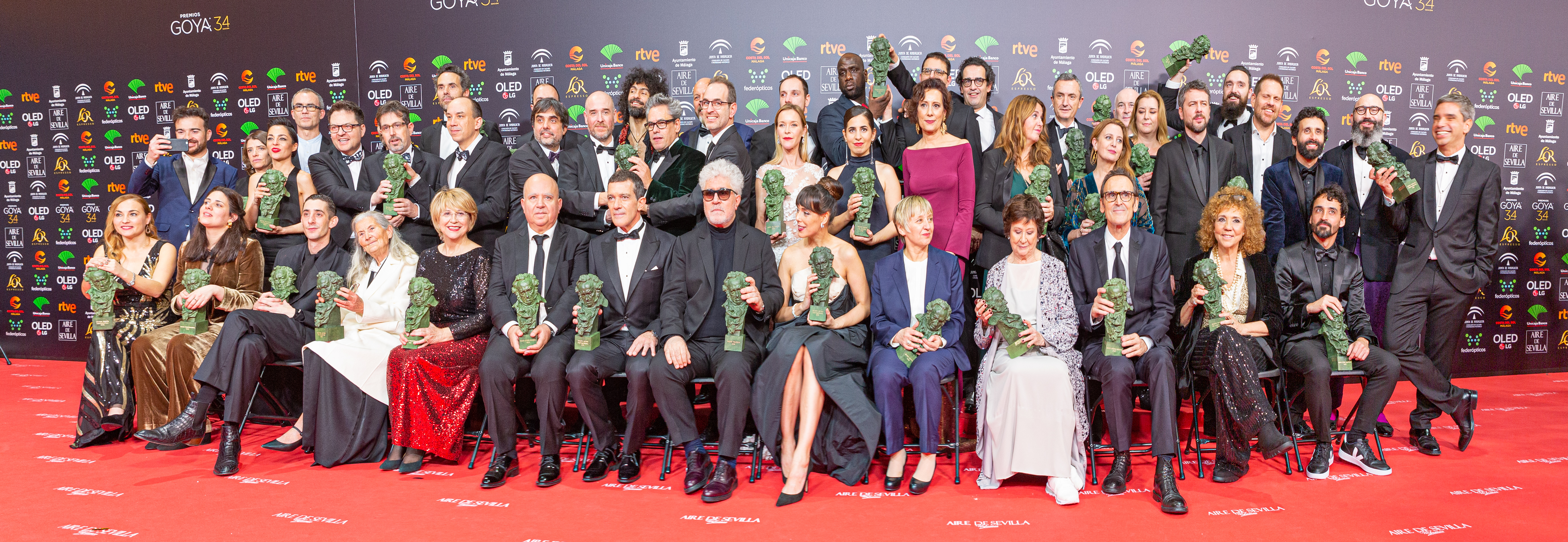 Foto familia de los premiados en la 34 edición de los Premios Goya